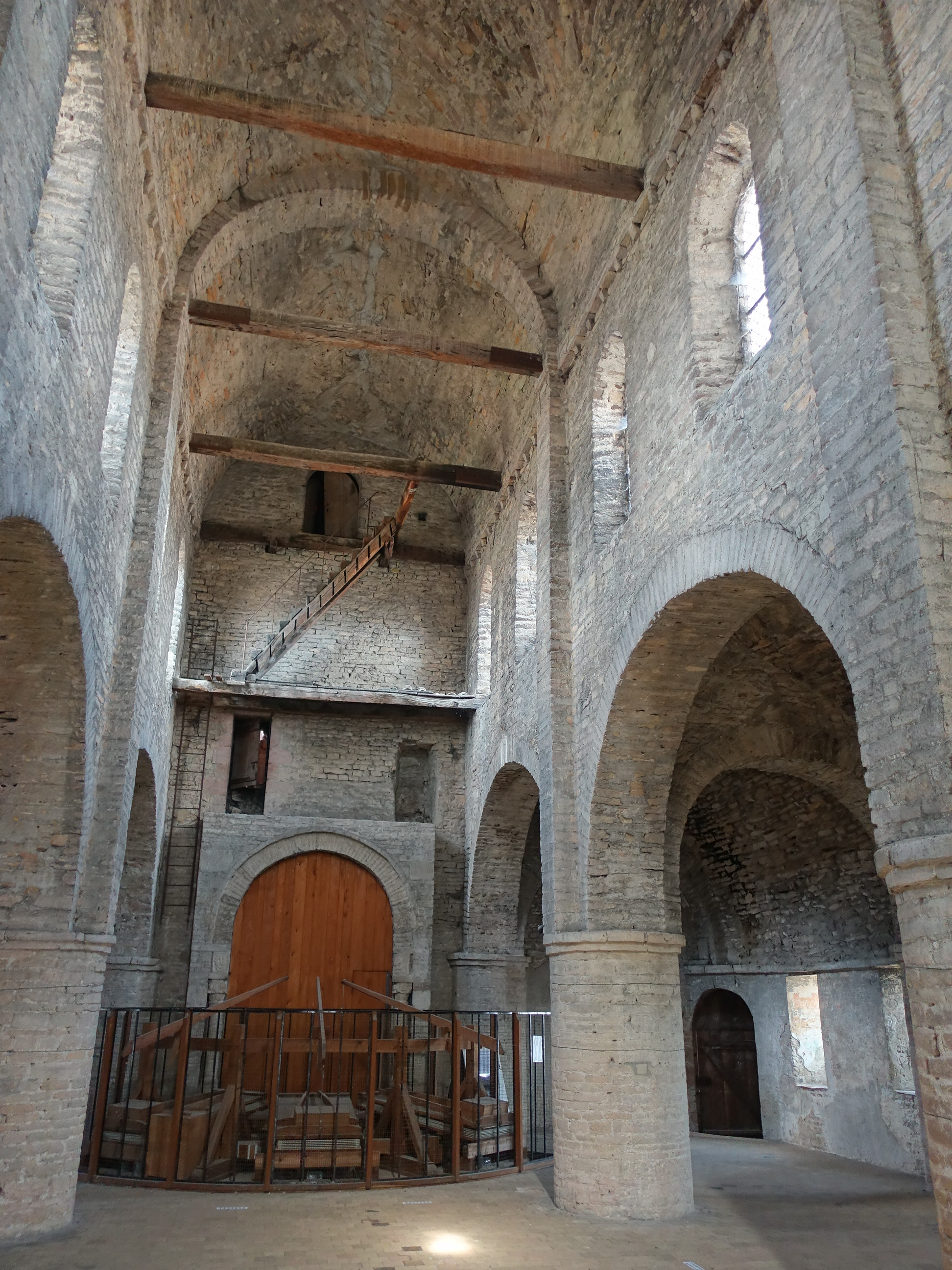 Romanische Abtei Saint-Philibert de Tournus im Burgund, Michaelskapelle im Westwerk nach Osten. Zu erkennen sind unten die Blasebalge für die ins Hauptschiff ragende Orgel.